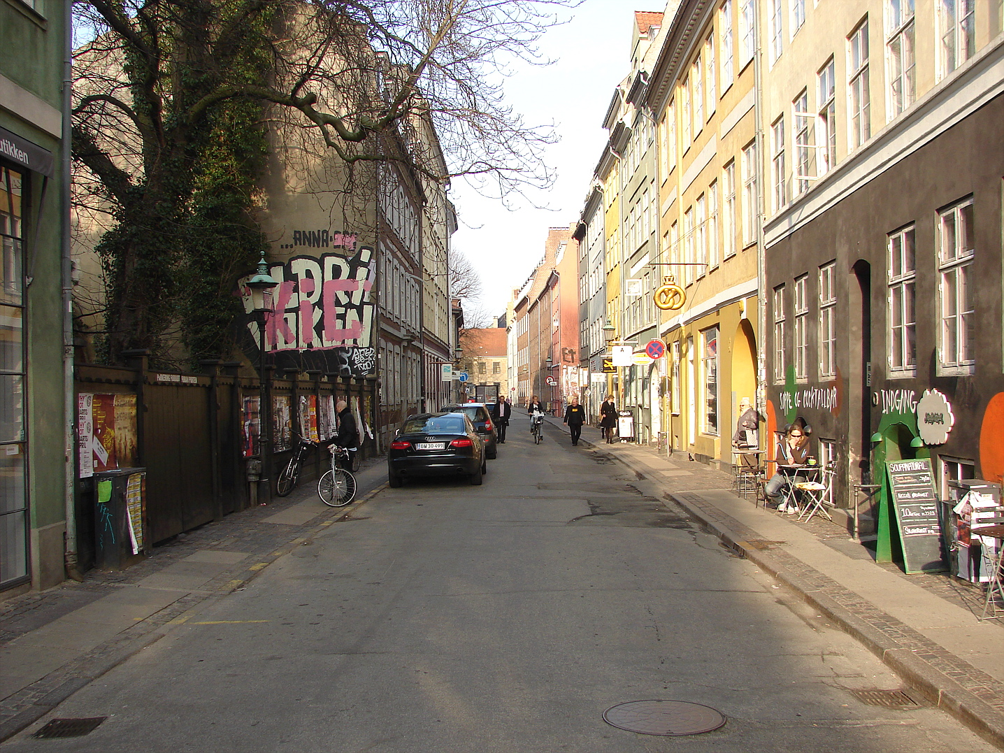 Sankt Peders Stræde, Indre By, København